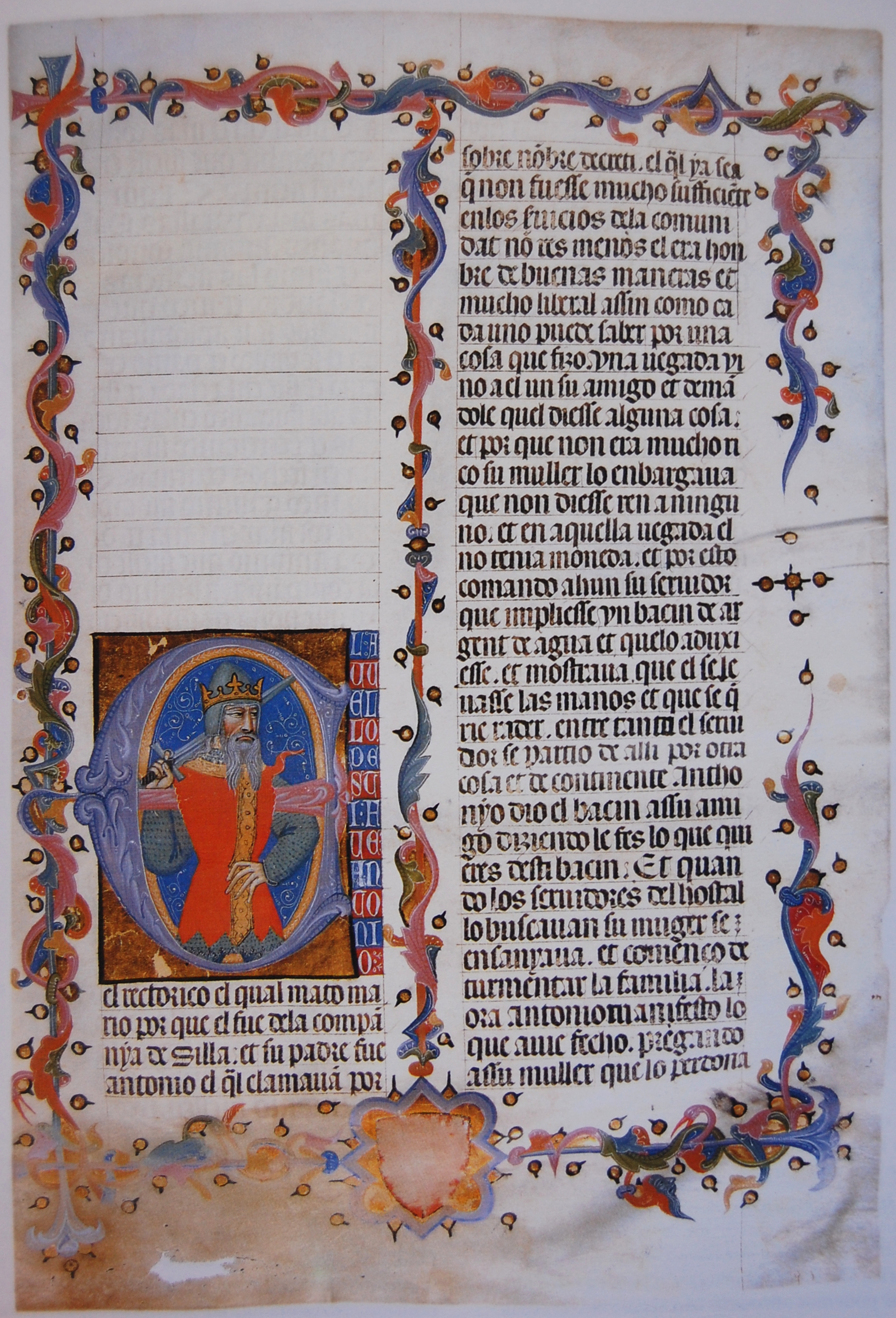 Aragonés: Primera pachina Grant Cronica de los Conquiridors II